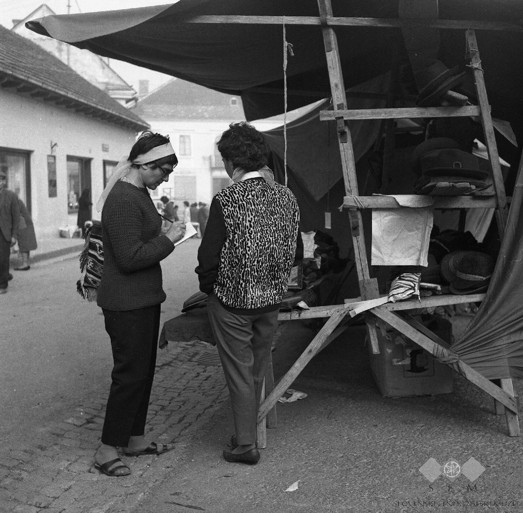 Marija Makarovič na sejmu v Metliki.